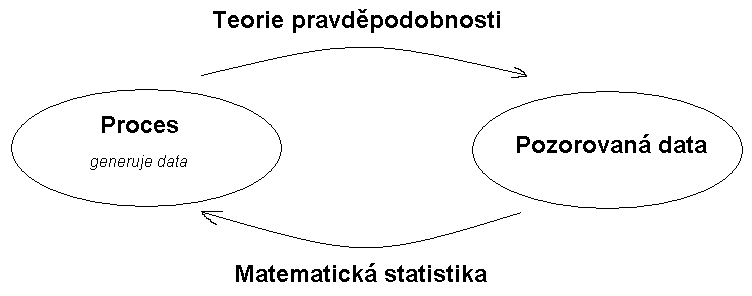 Souvislost mezi statistikou a pravděpodobností, dle Wasserman, All of Statistics, fig 1, obrázek je mé vlastní dílo